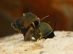 Sadleriana fluminensis aus Slowenien